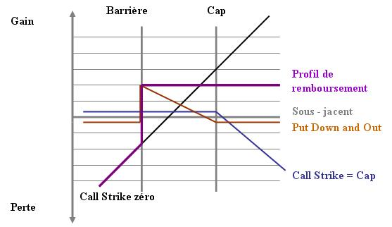 Profil de rendement d'un Bonus Cappé